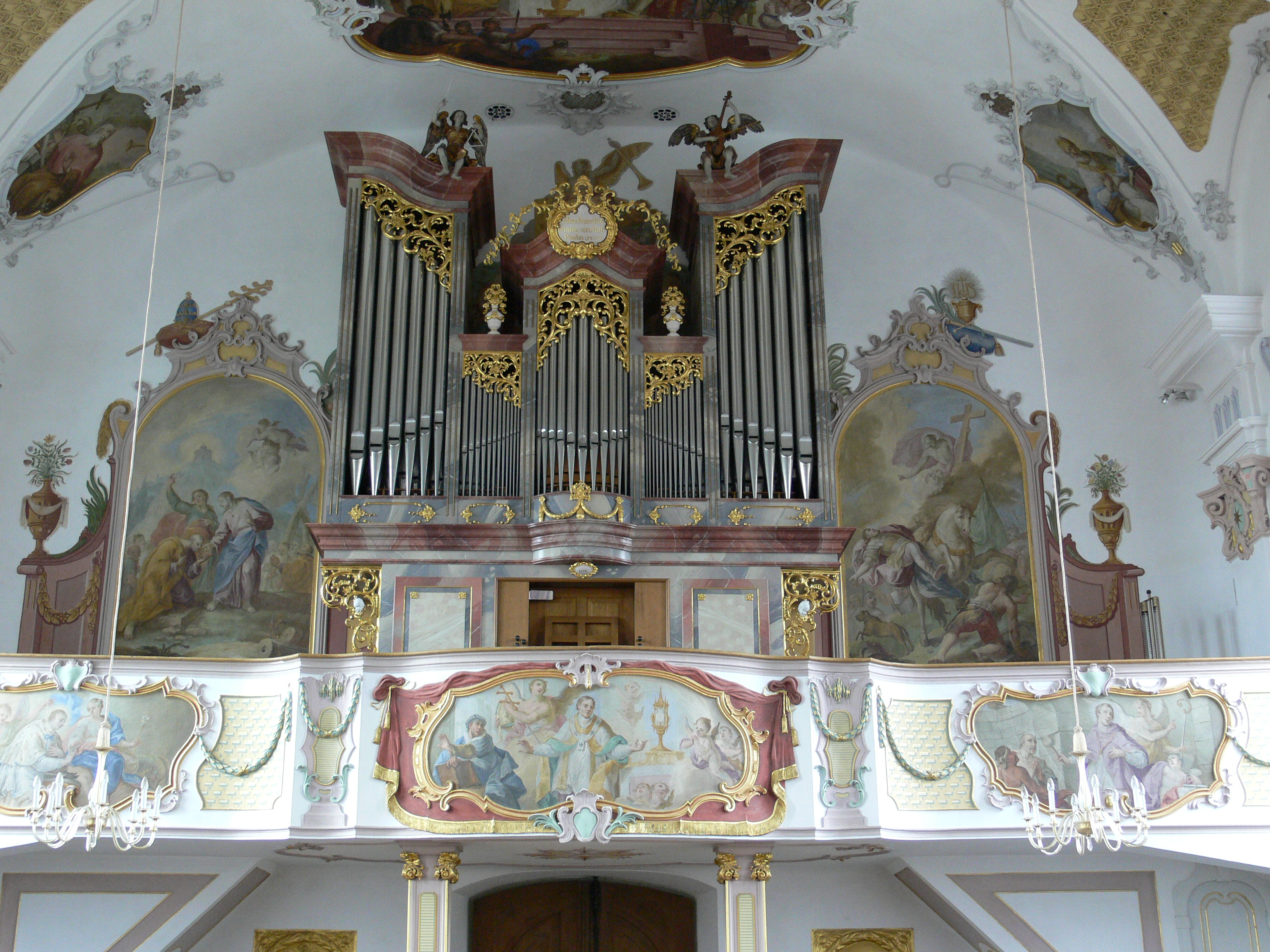 Rieger-Orgel von 1979; frühbarocke Engel auf dem Gehäuse (erworben 1932, evtl. aus der Waldseer Zürn-Werkstatt); Gemälde auf der Empore (Messiasbekenntnis Petri mit der Verheißung des Primats bei Caesarea Philippi und Bekehrung des Paulus) und der Emporenbrüstung von Andreas Meinrad von Ow Pfarrkirche St. Oswald, Otterswang Bad Schussenried, Landkreis Biberach, Baden-Württemberg